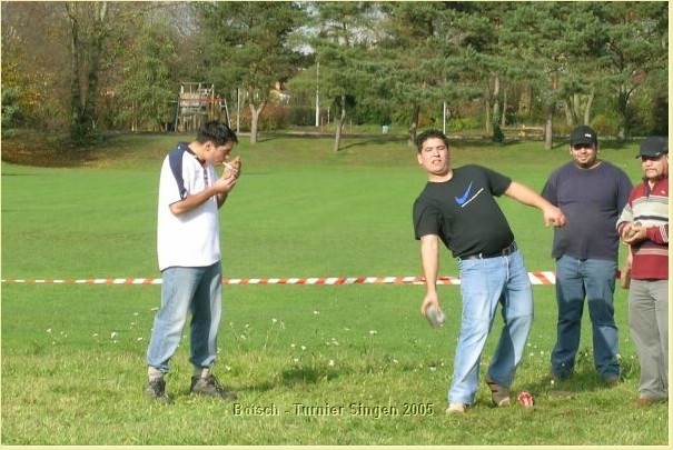 Bootsch-Turnier Singen 2005, Werfen des Bootschs